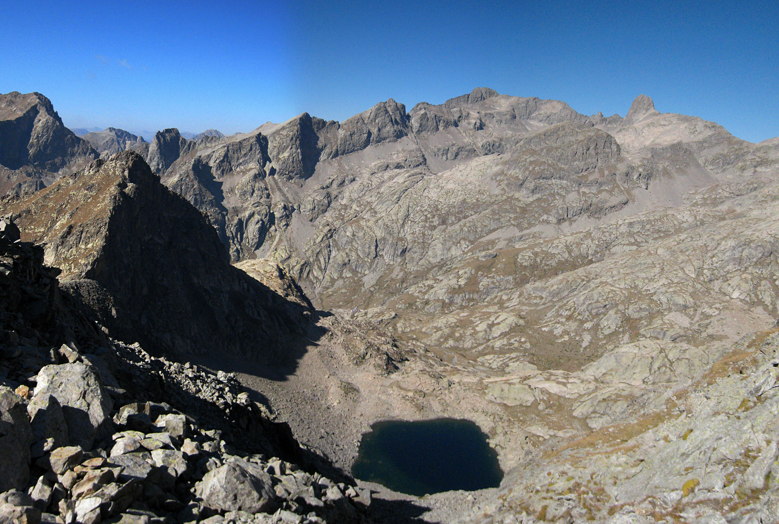 lac Niré, vallée de la Gordolasque, parc du Mercantour